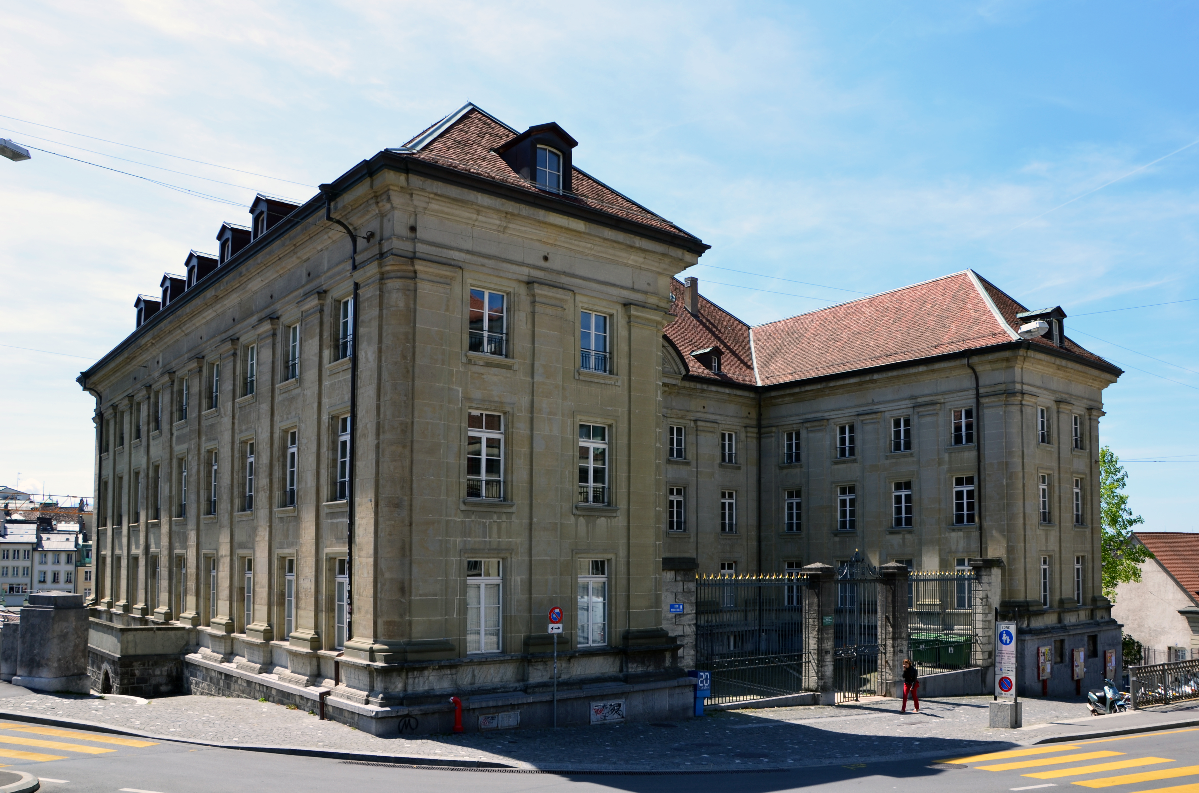 Le bâtiment de la Mercerie, qui fait partie du Gymnase de la Cité de Lausanne (Suisse)